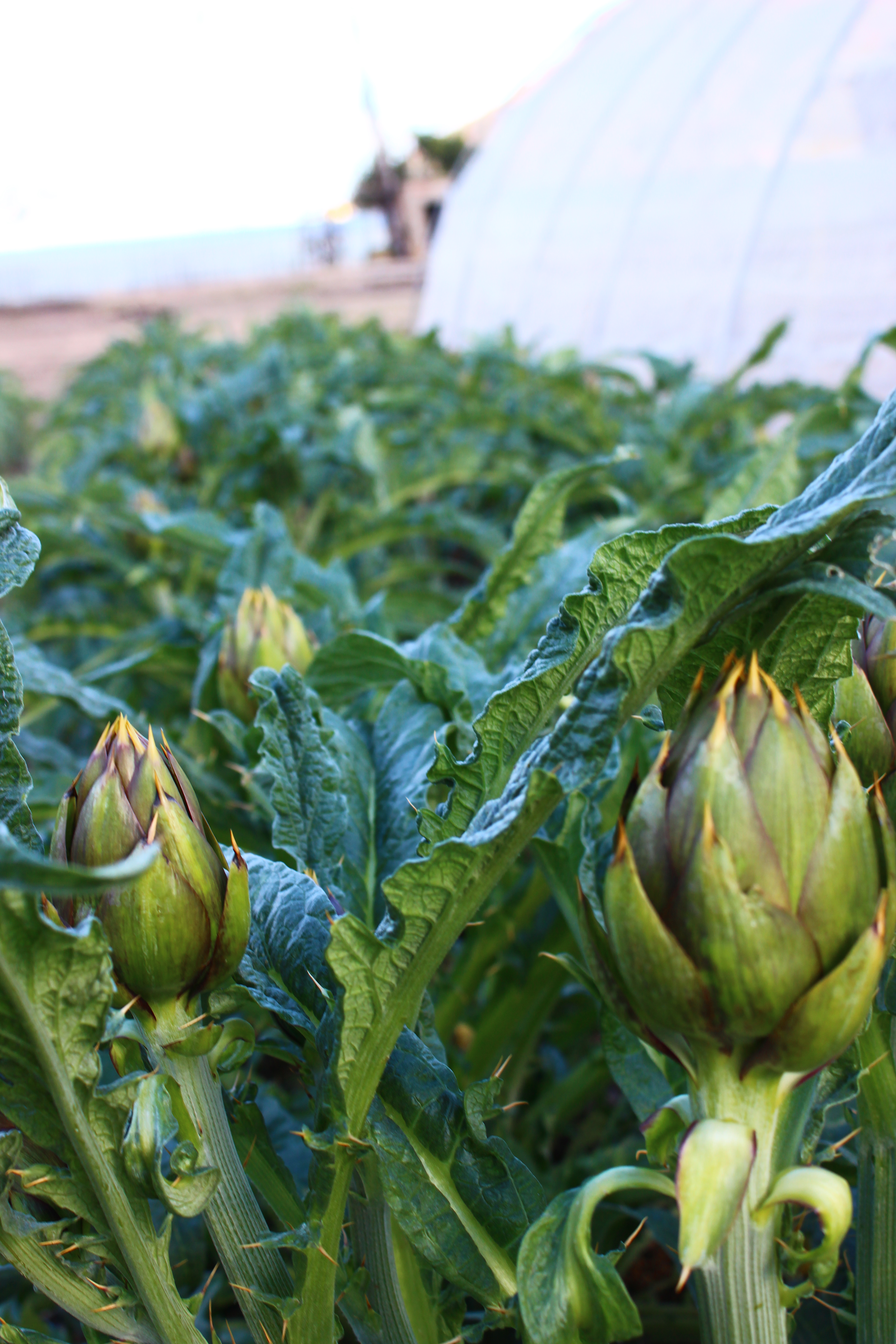 Campo di Carciofi spinoso di Albenga, a Lusignano